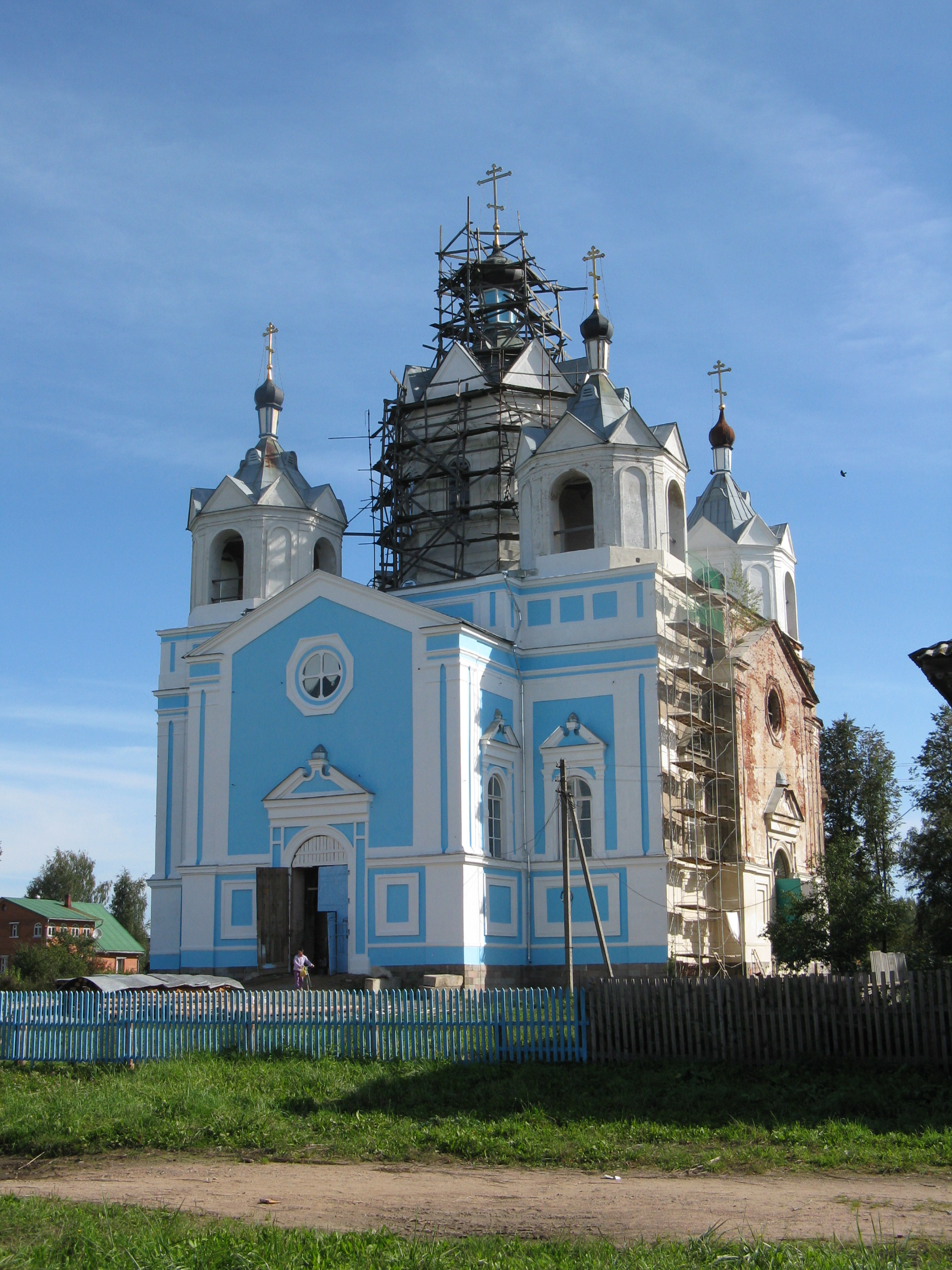 Храм Успения Пресвятой Богородицы (Демидов, Смоленская область)